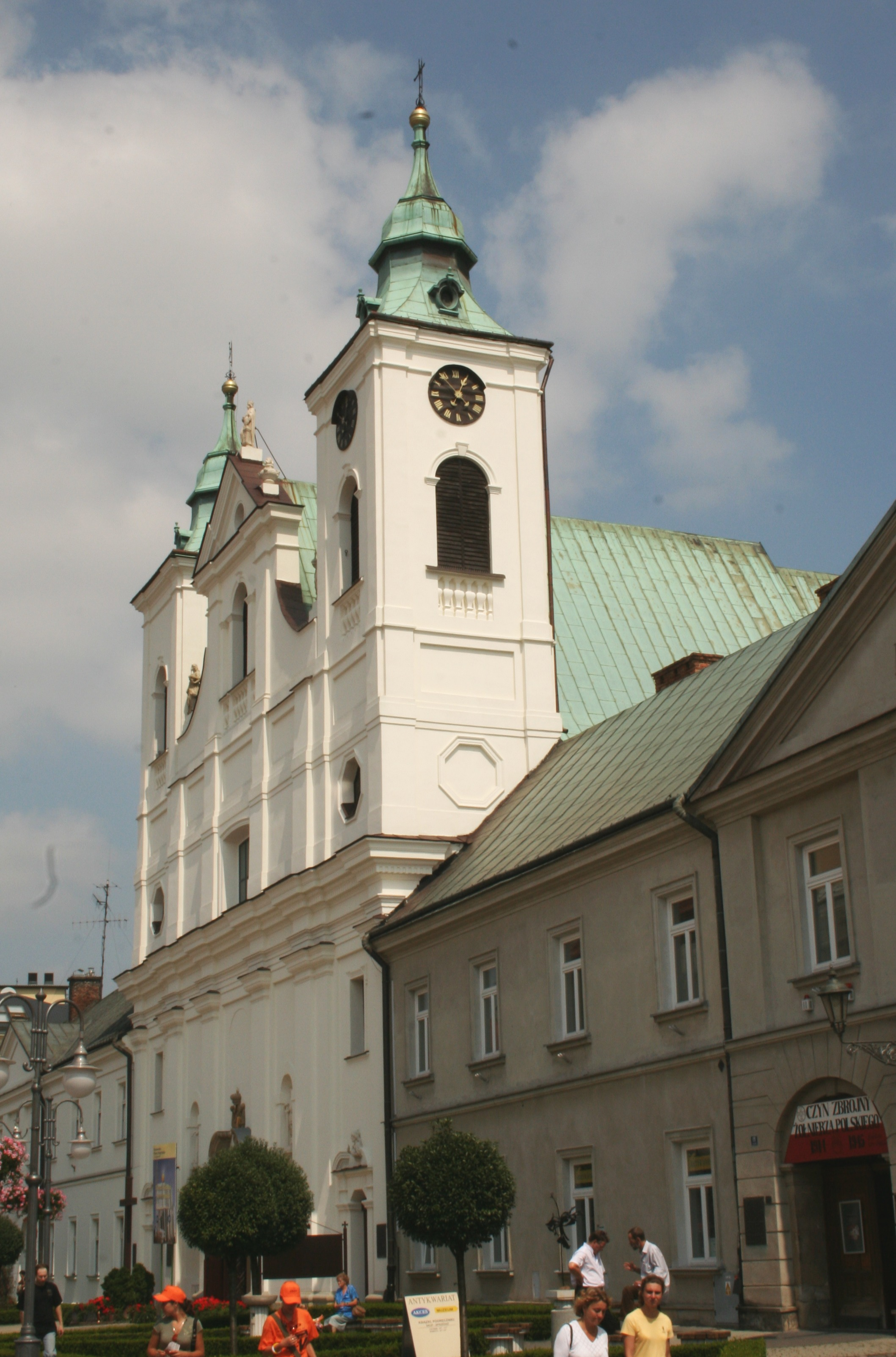 Kosciół św. Krzyża, Rzeszów